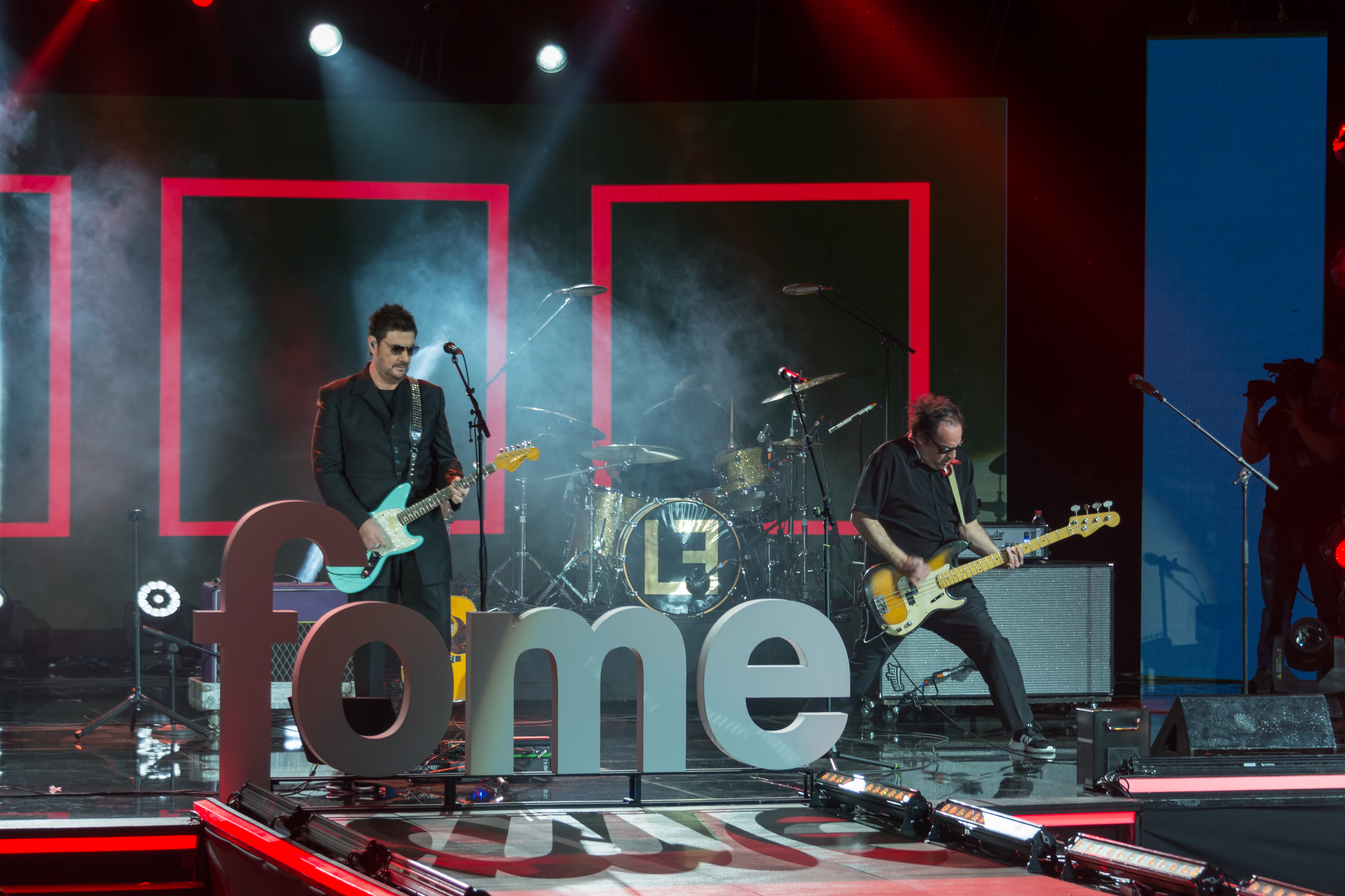 Los Tres, Premios Pulsar 2019, Teatro Teletón, Santiago, Región Metropolitana, Chile.